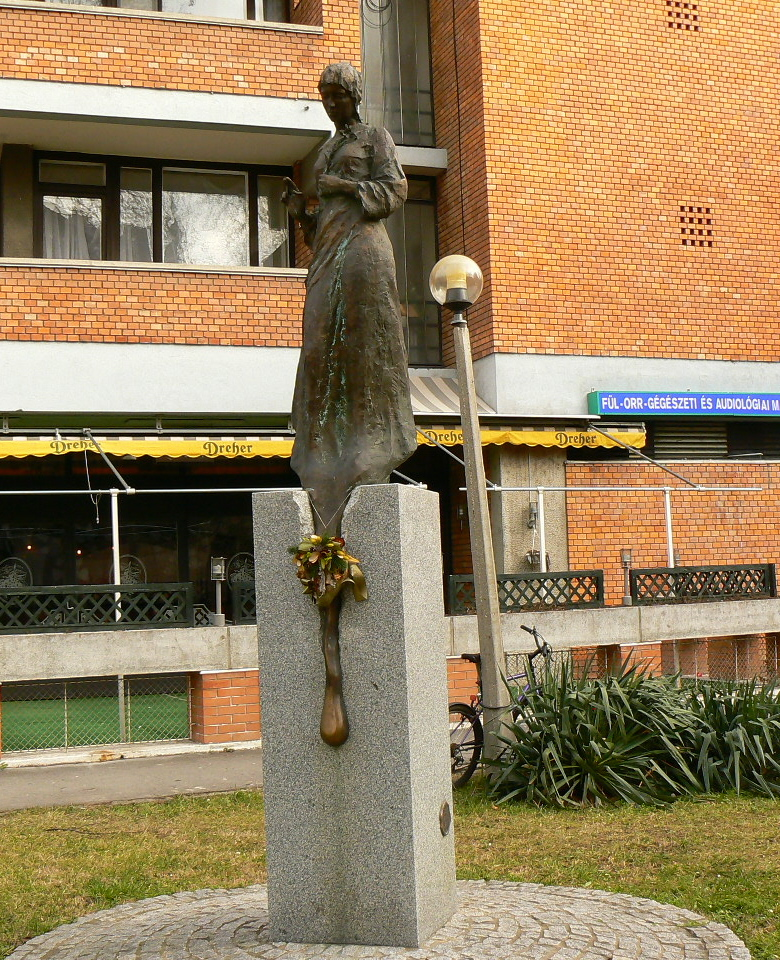 Popovics Lőrinc: Szent Borbála. A szobor a MOL Rt. Szegedi Bányászati Üzemének megbízásából és költségén készült, miután pályázatot hirdettek védőszentjük megmintázására. Az alkotó, az eddig nonfiguratív szobrászként ismert szegedi szobrász. A dómszerű alapra állított mészkőhasábból bontakozik ki Szent Borbála bronz alakja. A szoborból szépség, meghittség árad. Jobbját áldó mozdulattal emeli, baljában pedig a tisztaság liliomát tartja maga előtt. A drapéria posztamenssel érintkező része cseppként folyik a hasáb repedésébe. A bronzcsepp a nyersolaj formai megjelenése, amely közvetlenül kapcsolódik Borbála alakjához. A szobor fölállításával rangot kapott a belváros ezen szakasza.